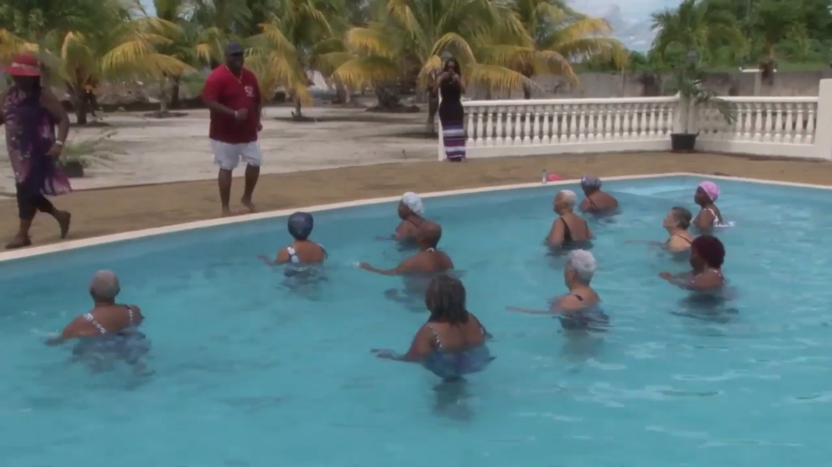 RCR Zorghotel, zwemoefeningen